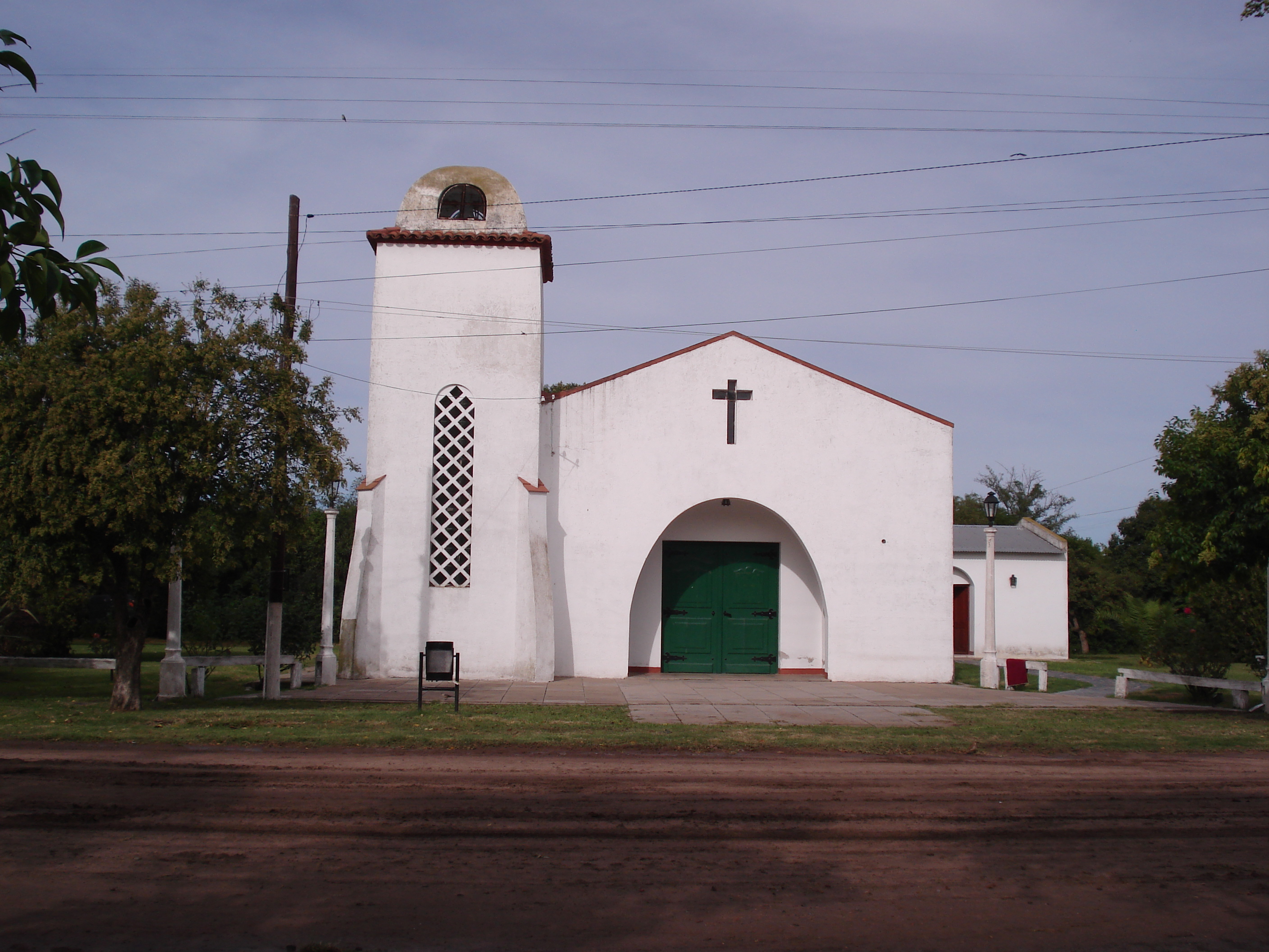 Iglesia del Sagrado Corazón de Jesús